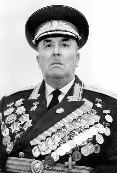 Иван Иванович Федюнинский (1900 — 1977) — советский военачальник